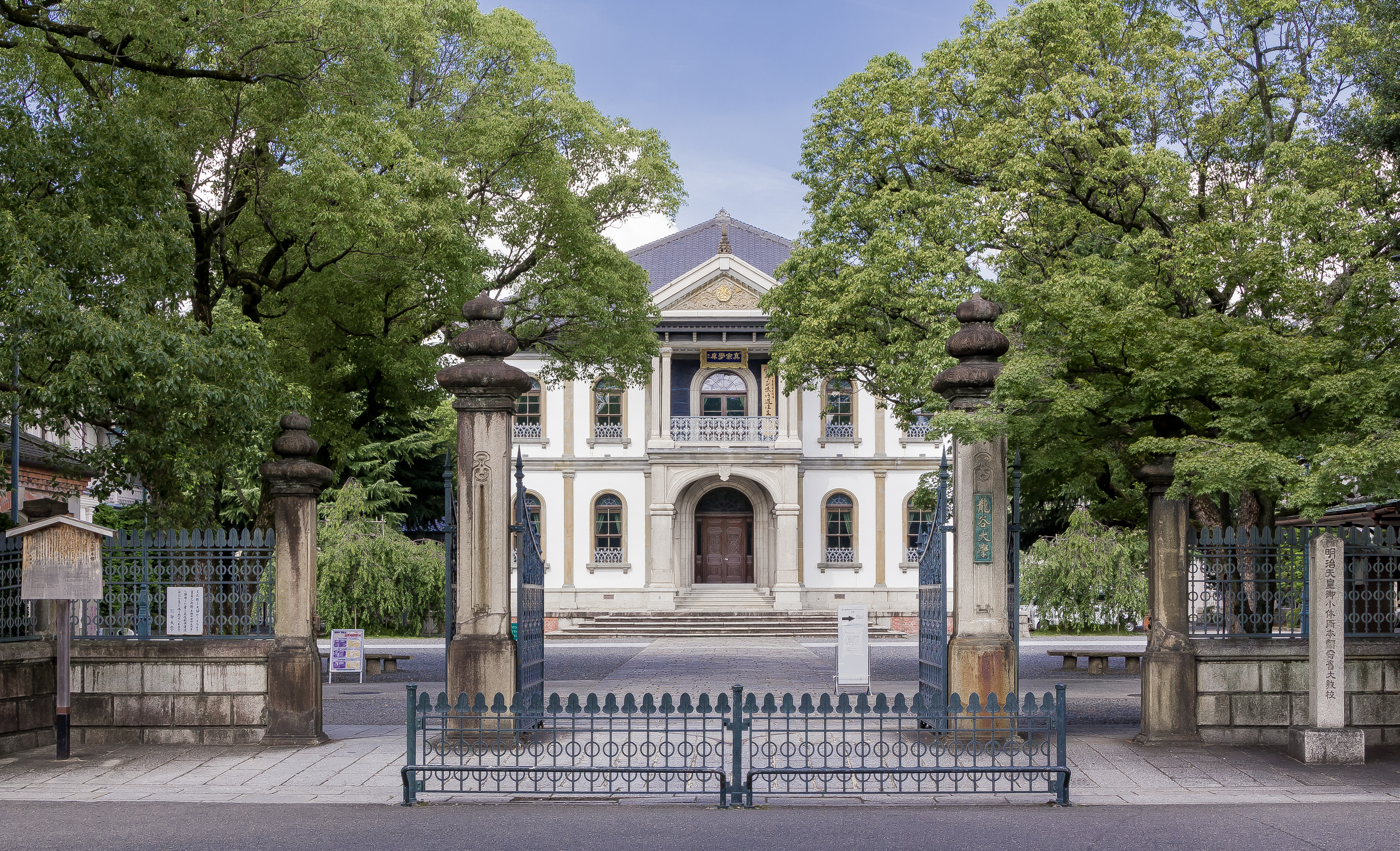 龍谷大学-正門と本館（ともに重要文化財）